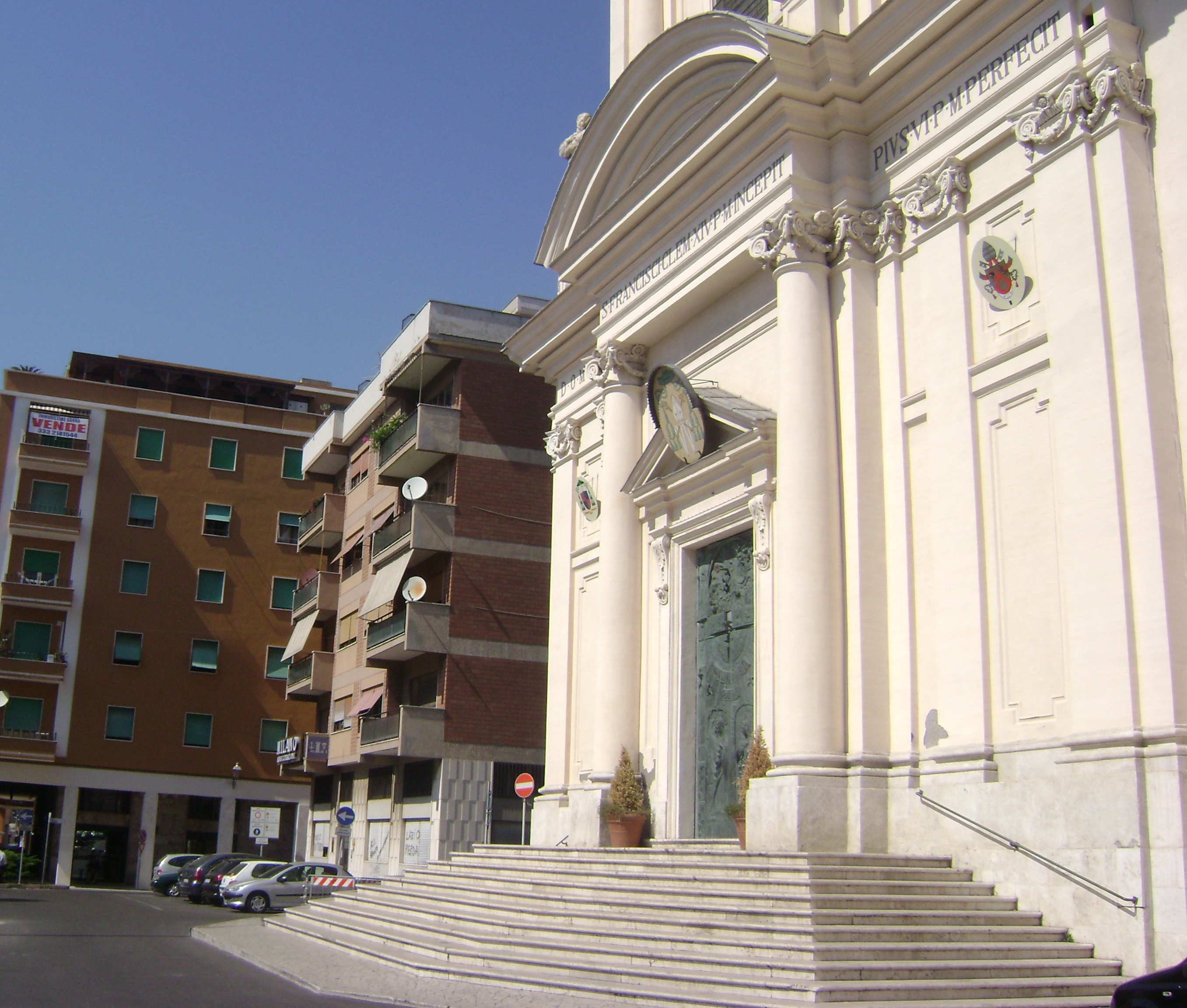 porta principale e gradinata